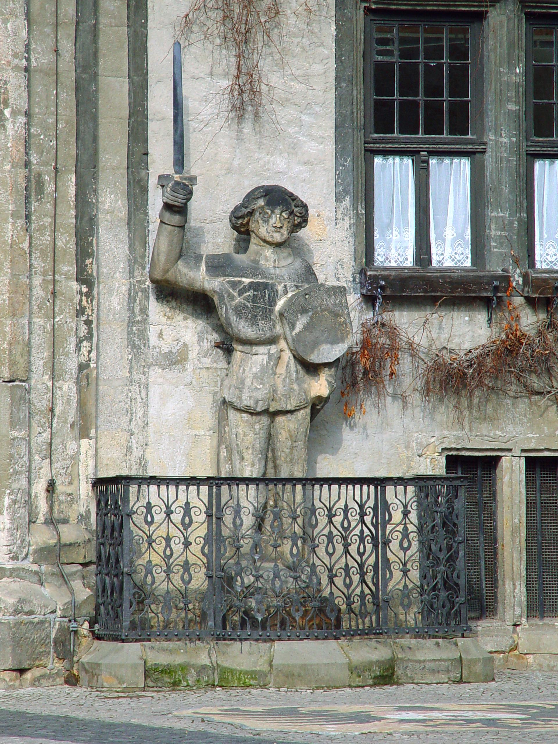 Fachwerkhäuser in Roland vor dem Rathaus in Quedlinburg